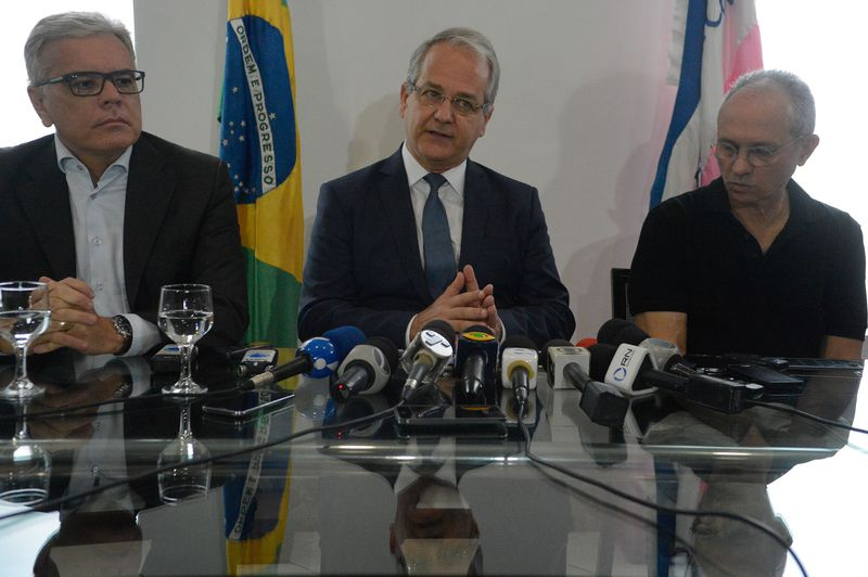 "Coletiva de imprensa na residência oficial do governo do Espírito Santo, sobre a crise na área de segurança pública no estado. Na foto, o secretário de Segurança André Garcia, o governador em exercício César Colnago e o governador Paulo Hartung"